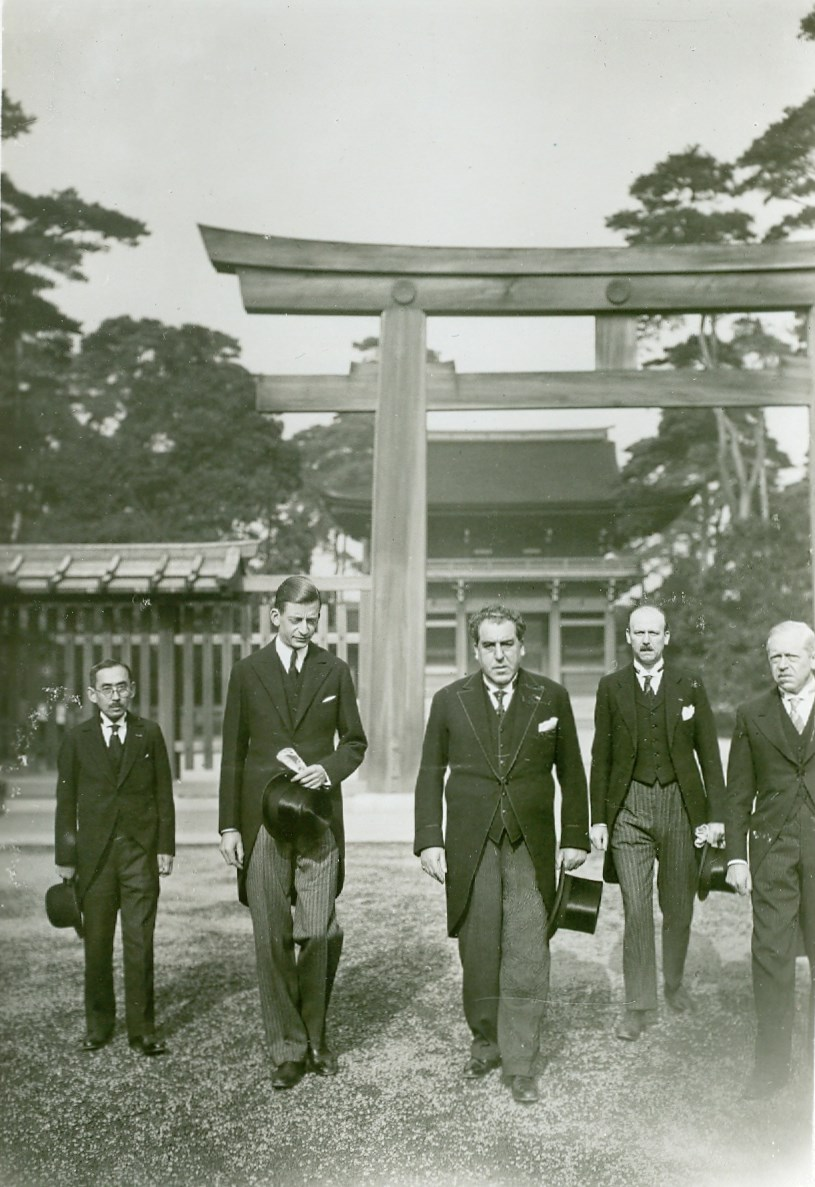 Ecrivain, Consul